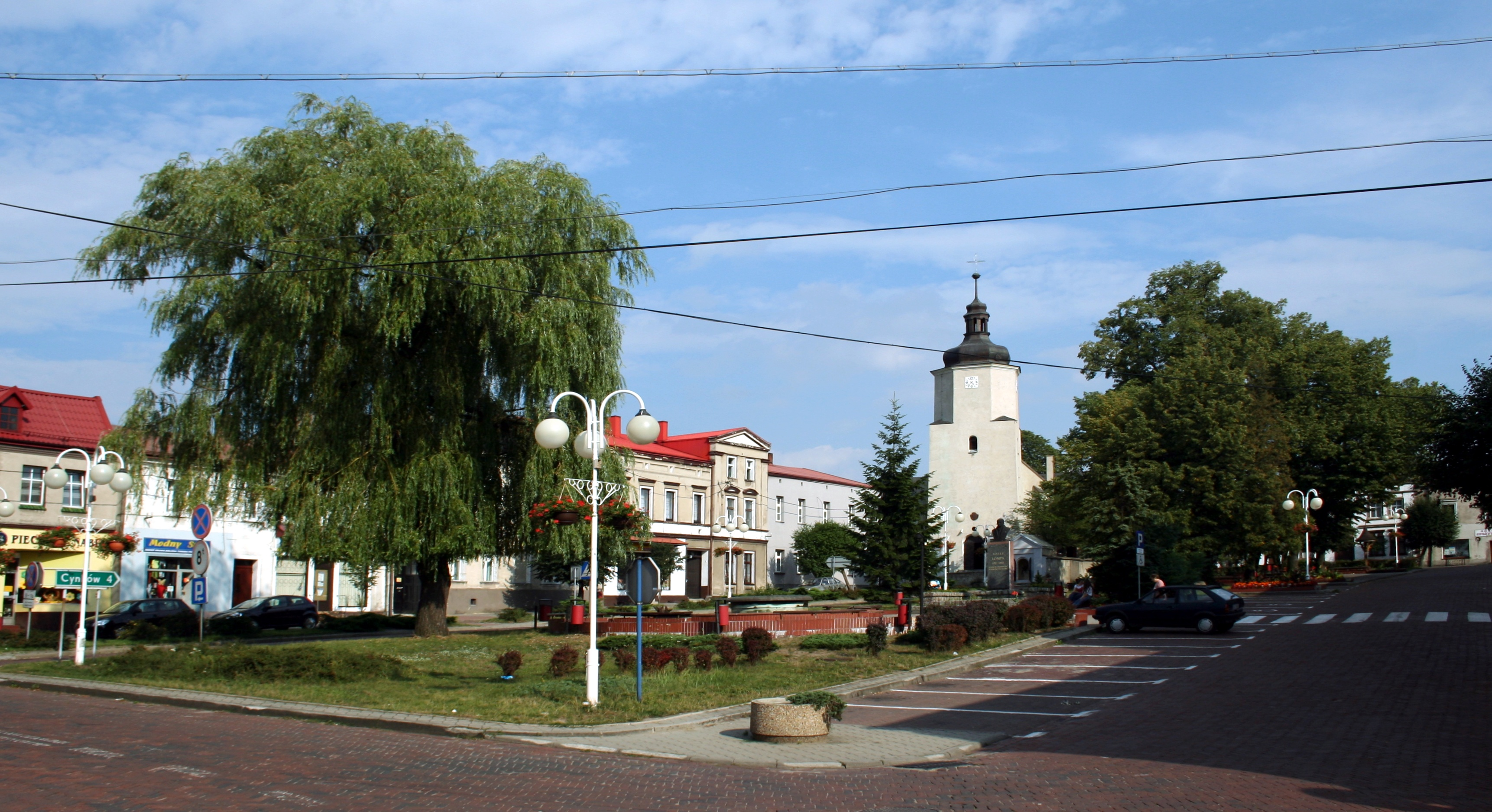 Rynek w Woźnikach, powiat lubliniecki